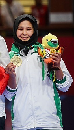 حمیده عباسعلی در مسابقه رده‌بندی کاراته بازی‌های آسیایی ۲۰۱۸